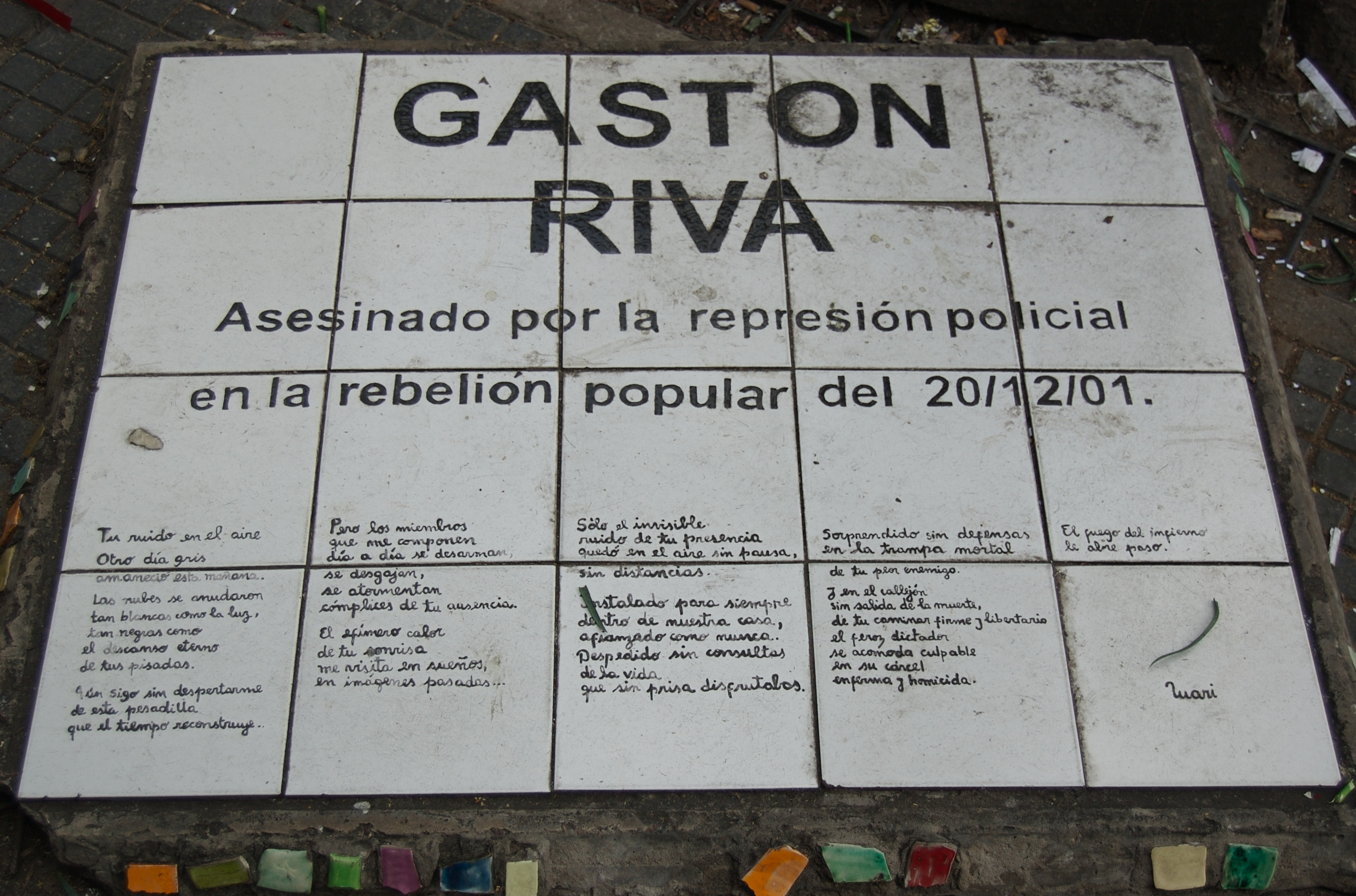 Placas improvisada con cemento y mosaicos realizadas por familiares de Gastón Riva, muerto en la represión de una manifestación el 20 de diciembre de 2001. Avenida de Mayo y Tacuarí, esquina noreste. Buenos Aires, Argentina